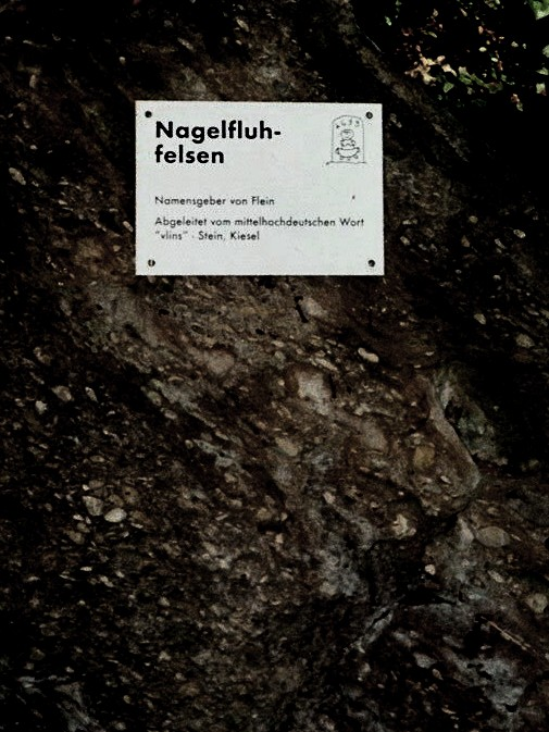 Flein_Nagelfluhfelsen_Namensgeber_abgeleitet_von_VLINS_mittelhochdeutsch_für_Stein,_Kiesel, an dem Weg hinauf zur Veitskirche von der Ilsfelder Straße aus.